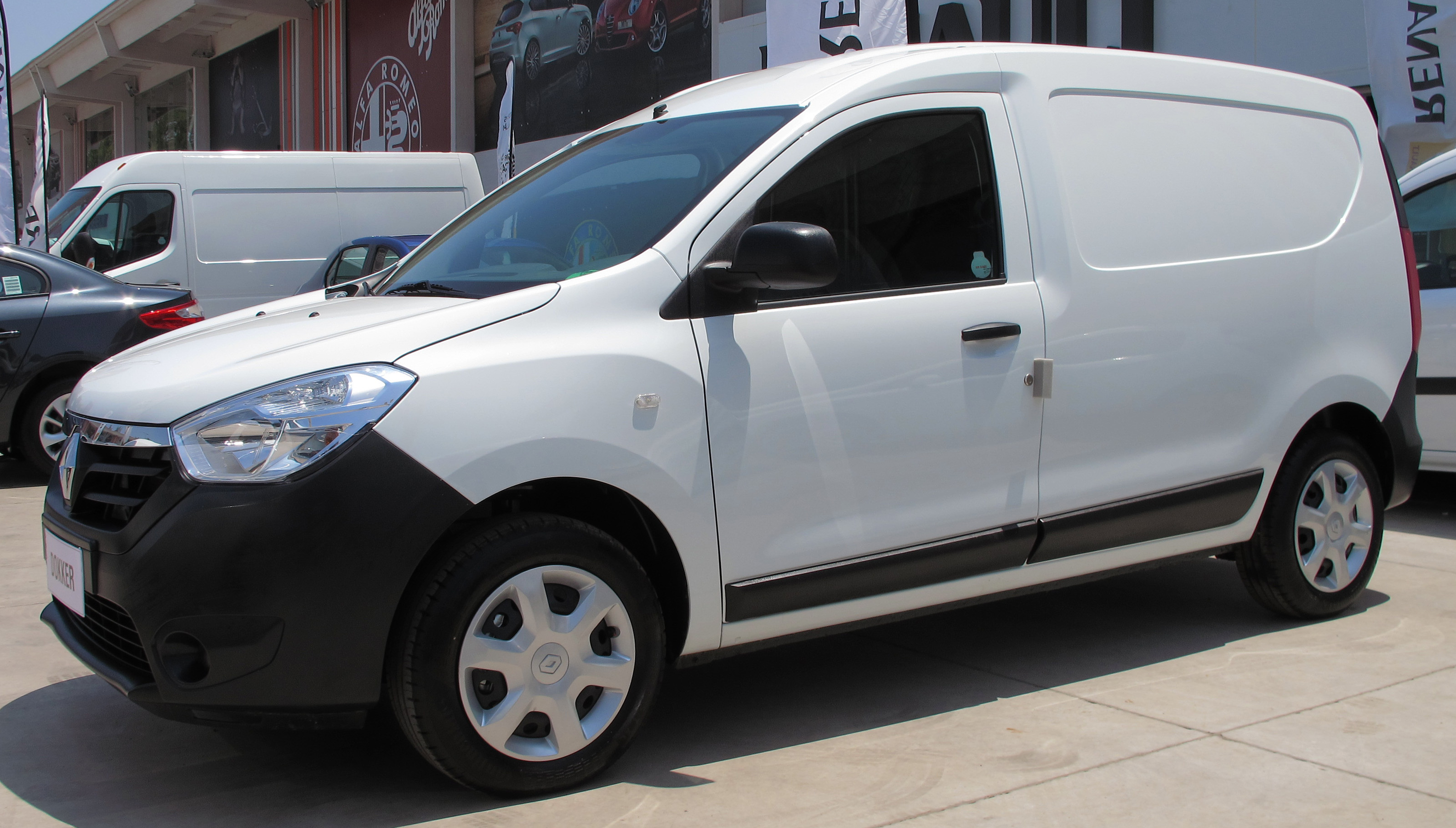 Renault Dokker 1.6 Cargo 2015